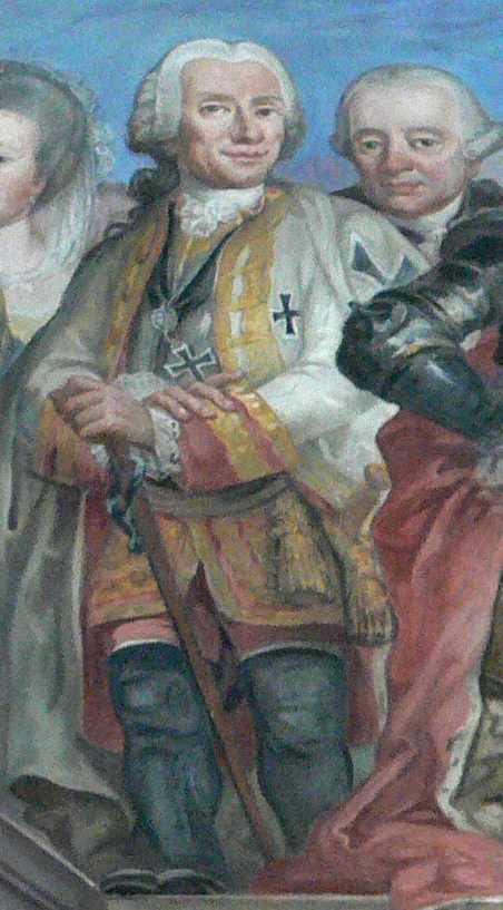 Bad Wurzach, Pfarrkirche St. Verena, Deckenfresko im Mittelschiff von Andreas Brugger Ostteil, Porträt Christian Moritz Eugen Franz von Königsegg-Rothenfels, Landkomtur der Deutschordenskommende Altshausen, Bruder der Gräfin Maria Eleonore v. Waldburg